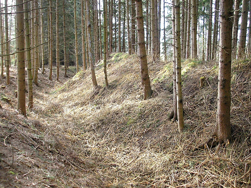 Frühmittelalterlicher Ringwall Walleshausen (Gemeinde Geltendorf, Landkreis Landsberg am Lech, Oberbayern). Der Wallgraben nach Süden. Eigene Aufnahme, Feb. 2008 / Early Middle Ages ringwork castle Walleshausen near Geltendorf (Upper Bavaria, Germany). The earthworks, looking south. Own photo, Feb. 2008